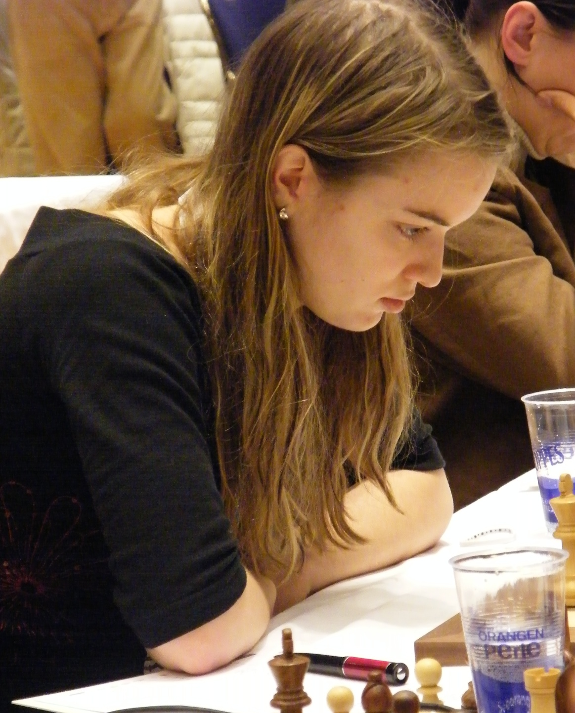 Sona Pertlova bei der 38. Schacholympiade in Dresden 2008